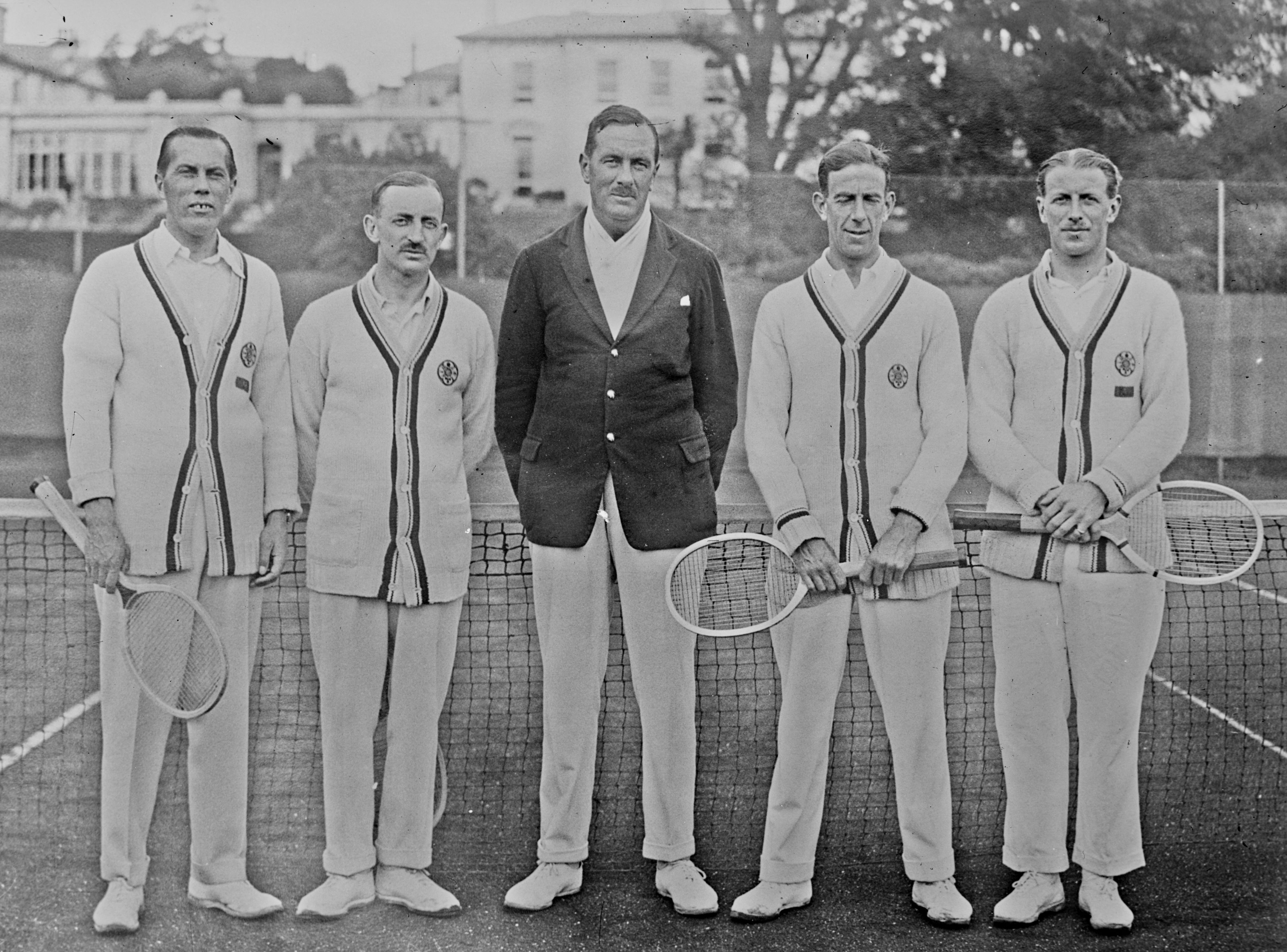 De g. à d. les tennismen anglais Godfrey, Kingscote, Gilbert, Woosnam et, au centre, leur entraîneur Riseley.